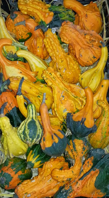 zucche ornamentali